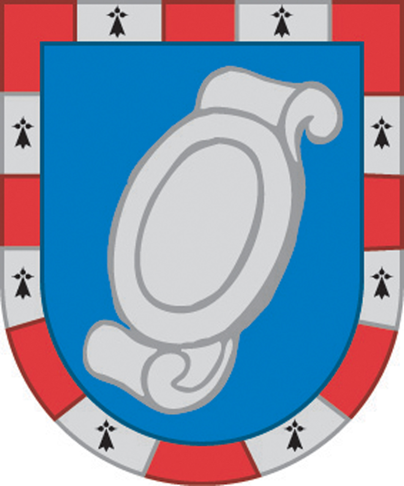 Ätten Silfverskiöld nr 1073. Adlad 1686-05-08, introducerad 1686